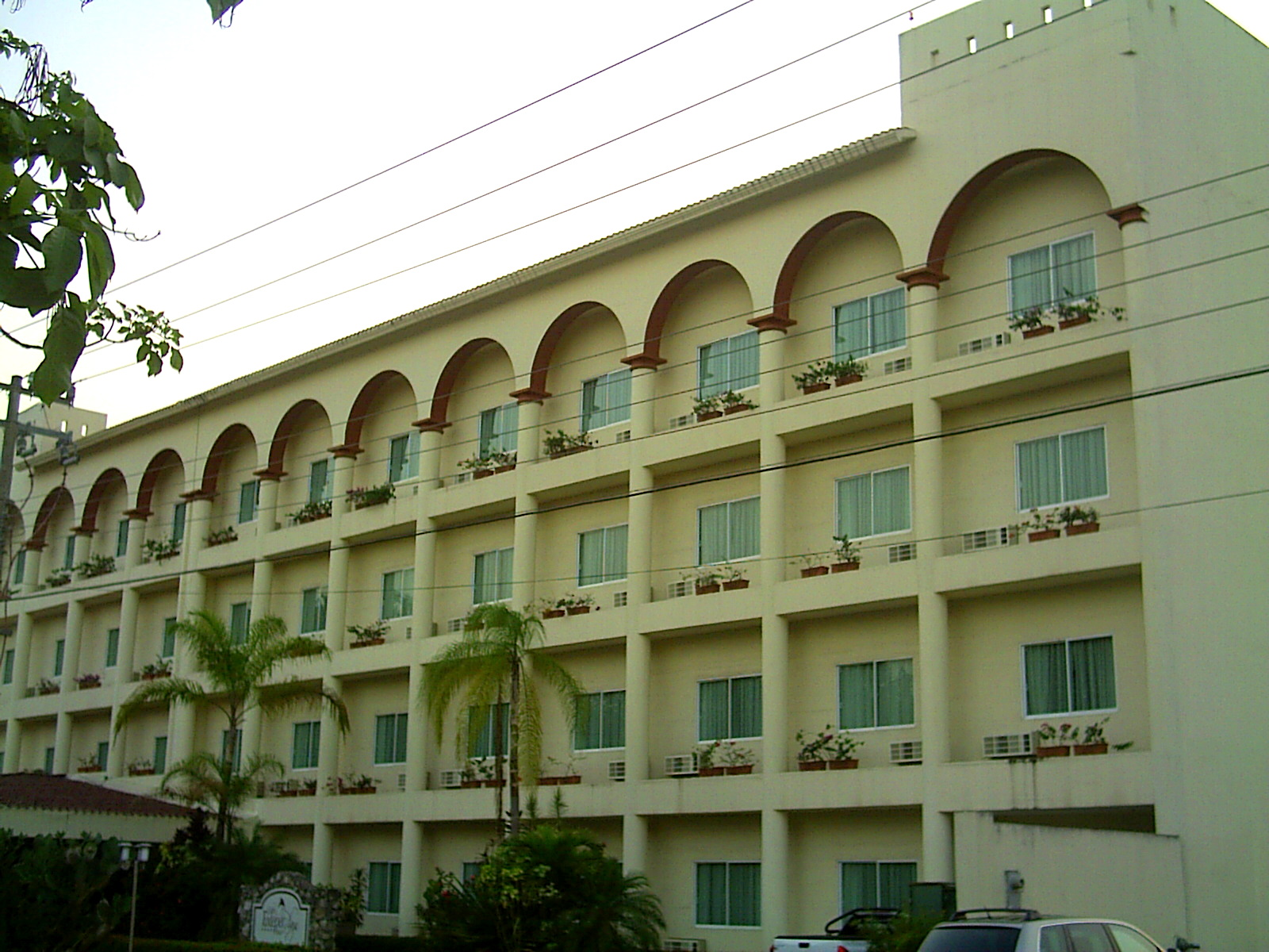 Edificio principal del Hotel Gran Plaza de Tuxtepec, principal hotel en su categoría de la Cuenca del Papaloapan.